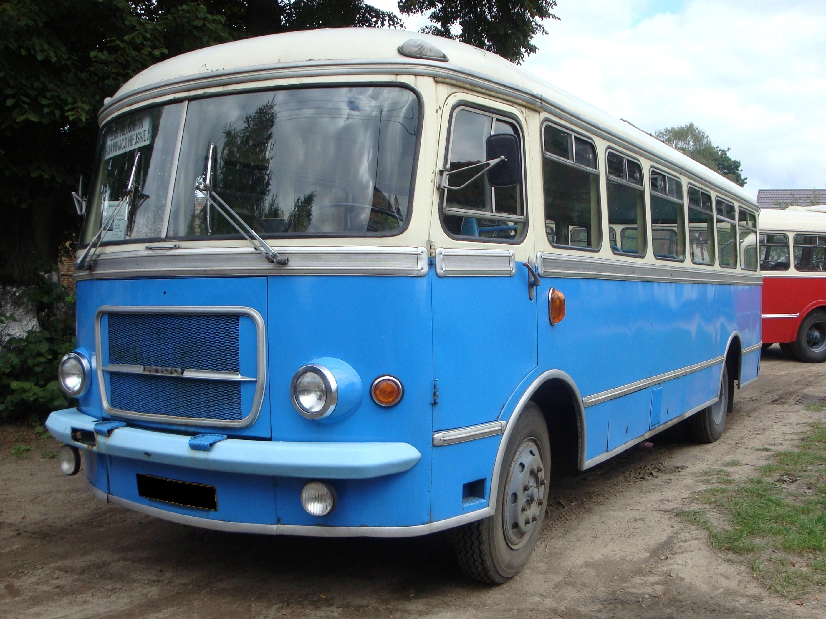 San H100A z przodu.